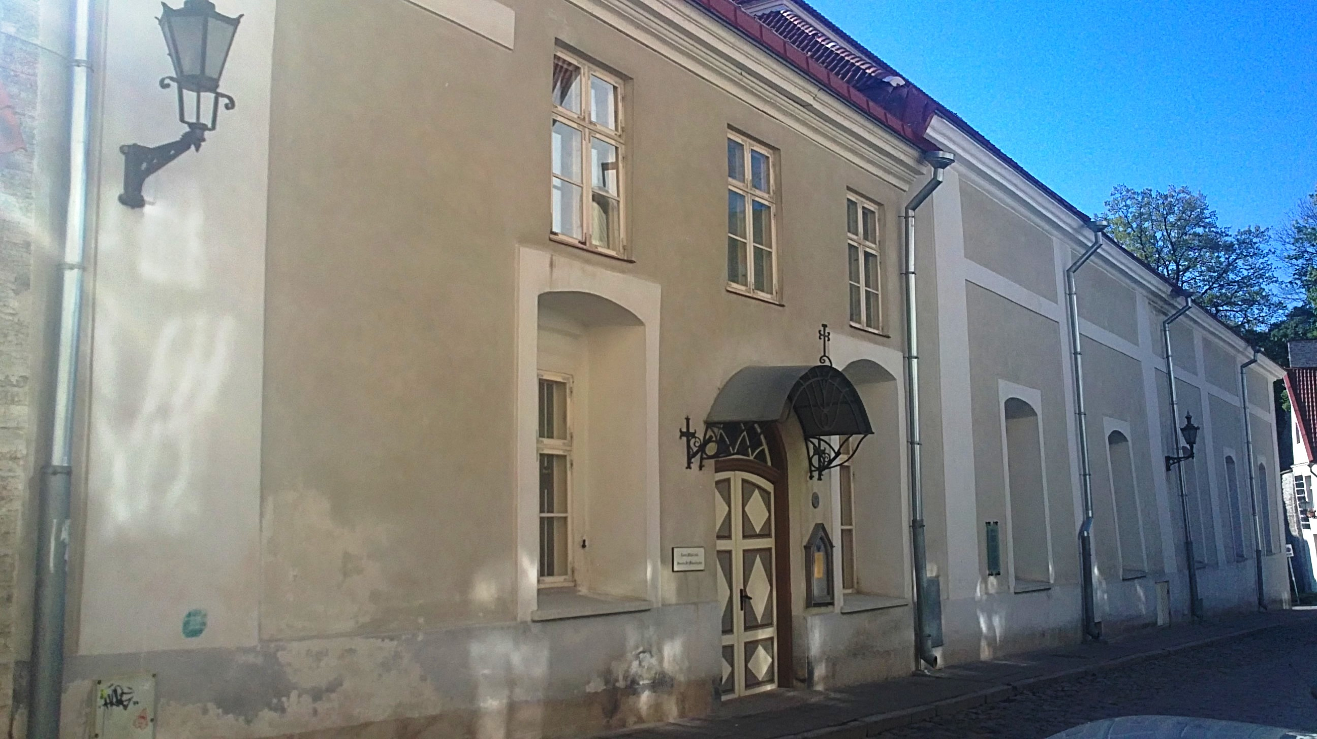 Tallinna Rootsi-Mihkli kirik, Rüütli tänaval Tallinnas